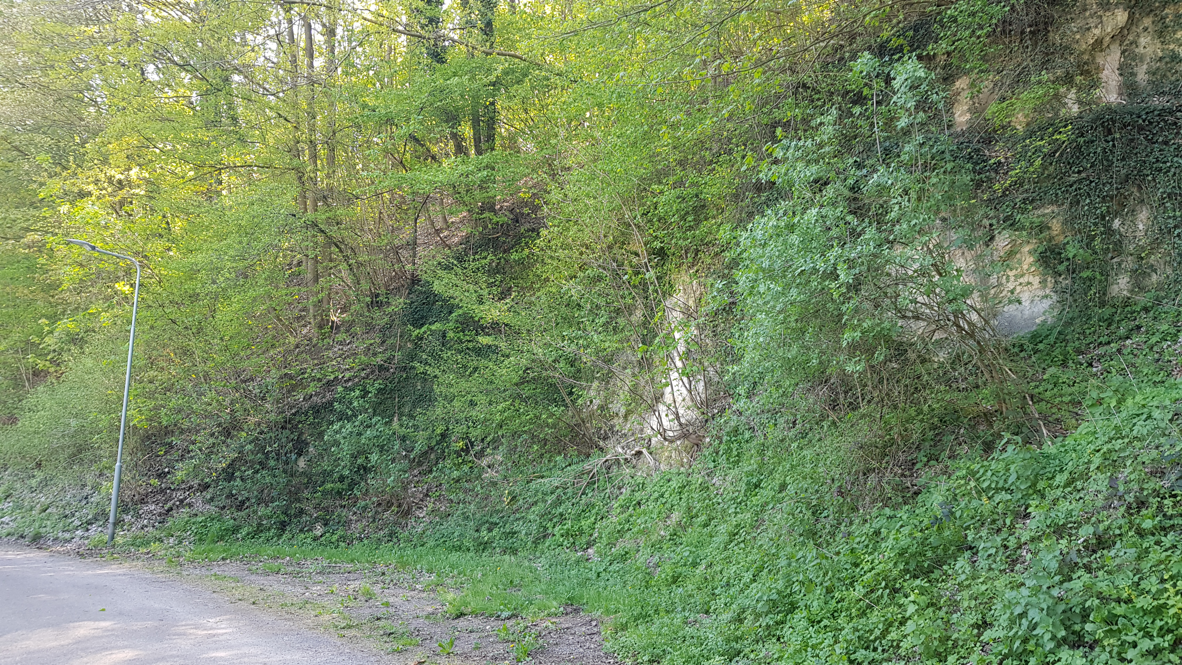 Groeve het Paradijsbergske Ia, Geulhem, Nederland